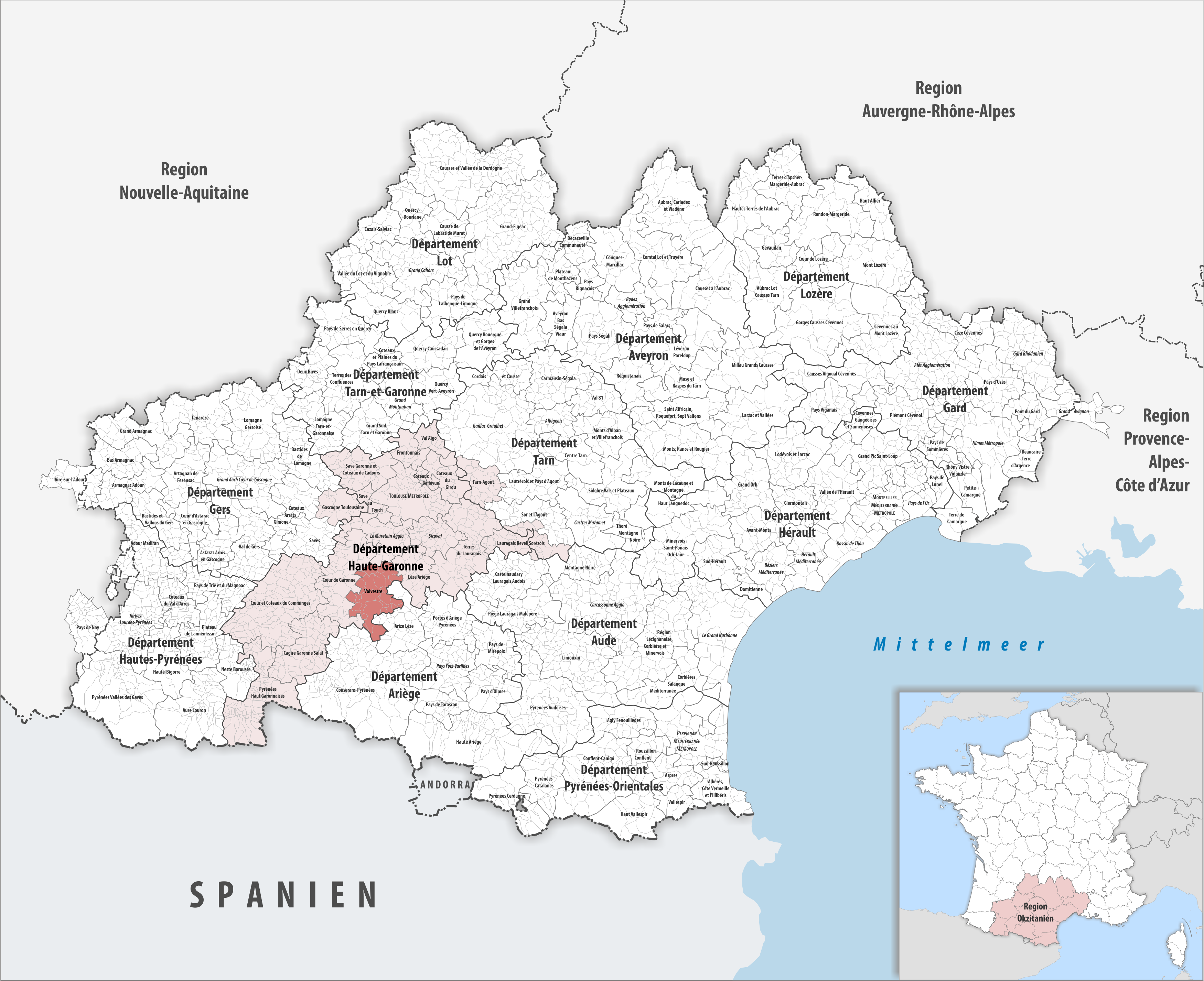 Lage des Gemeindeverbandes Volvestre